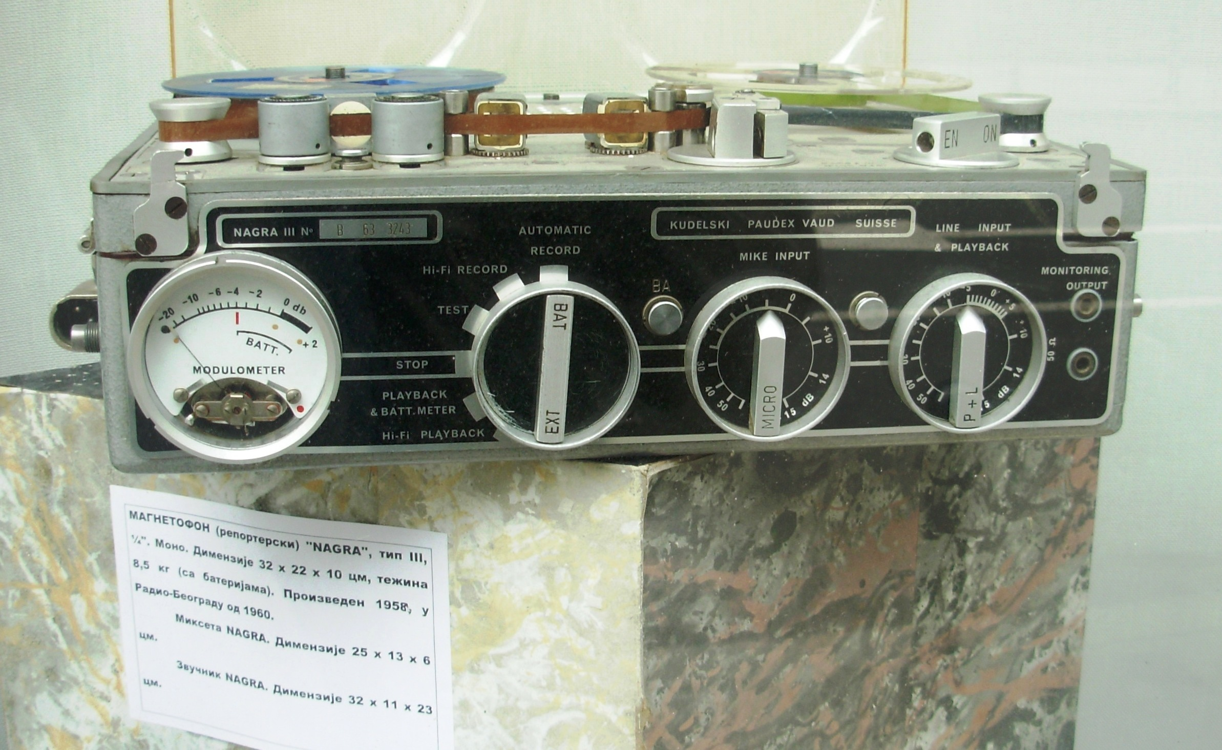 Magnetofon koji je bio u upotrebi u Radio Beogradu. Slikao Goldfinger Nagra III (1958) — 1/4", mono.